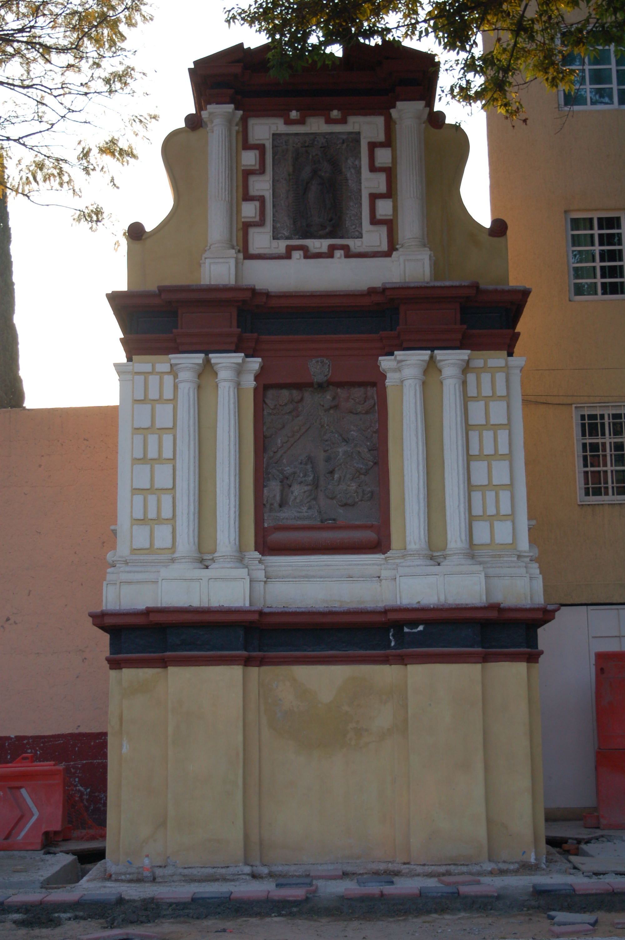 Misterio La Encarnación del Hijo de Dios